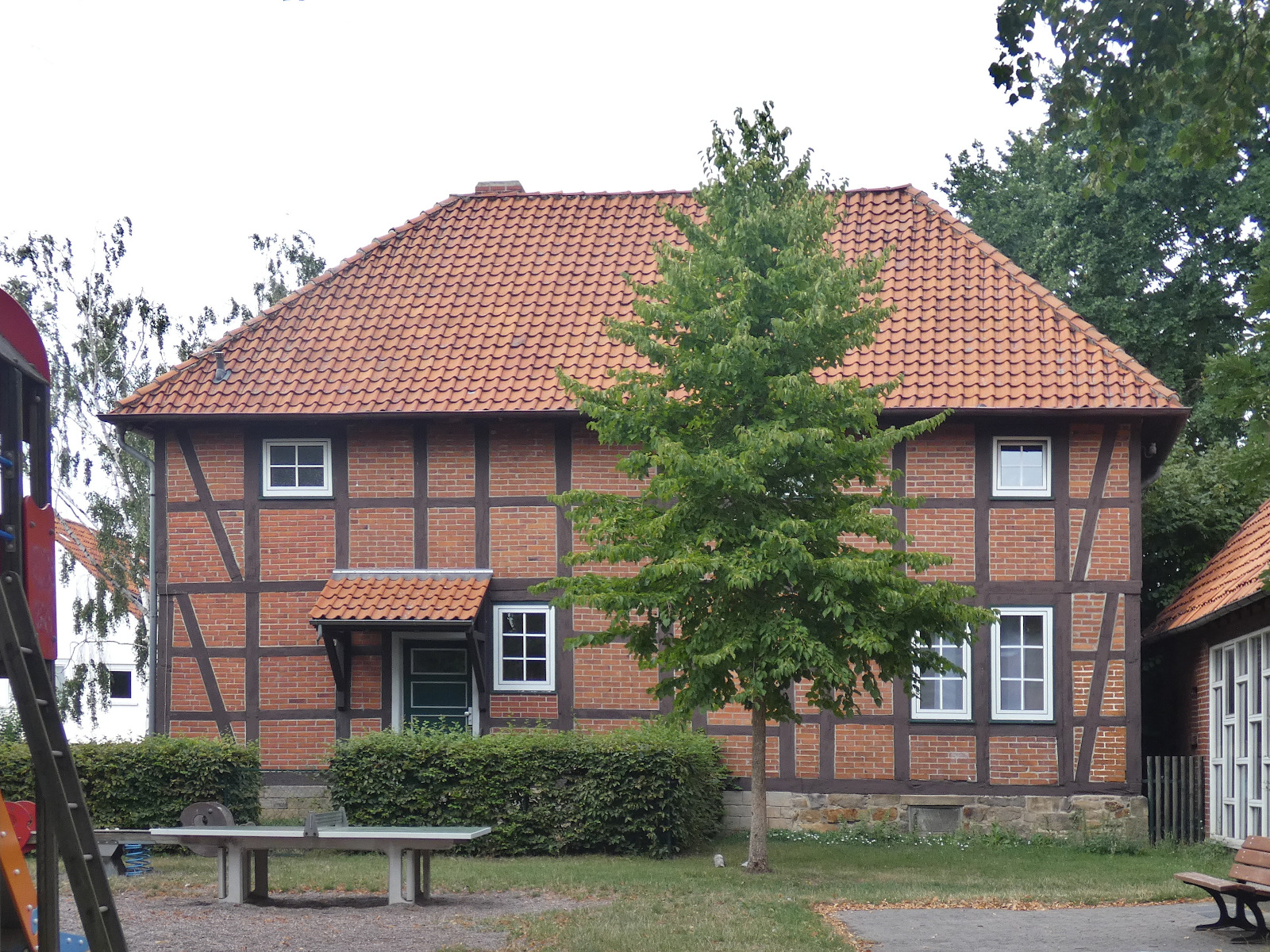 Ehemalige Dorfschule, heute durch die Ortsfeuerwehr genutzt. Zweistöckig abgezimmertes Fachwerkgebäude aus dem späten 19. Jahrhundert. Fast quadratischer Grundriss mit niedrigem Oberstock unter einem Walmdach.